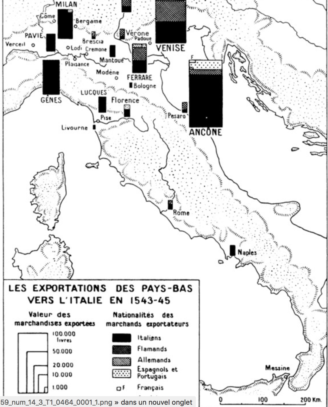 Carte des exportations des Pays-Bas vers l'Italie (1543-1545) avec valeurs des marchandises et nationalités des marchands. Le port d'Ancône est dominant. Document issu de L'Exportation des Pays-Bas vers l'Italie par voie de terre, au milieu du XVIe siècle, Wilfried Brulez,1959, 14-3 pp. 461-491